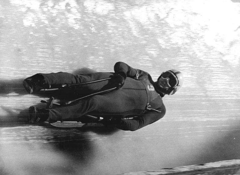 Hans Rinn ADN-ZB Demme 7.1.1973-Oberhof: 1. Durchgang zur DDR-Meisterschaft im Rennschlittensport am 6.1.1973-Hans Rinn (ASK Oberhof), hier bei einen früheren Rennen, liegt nach den ersten zwei Rennen an der Spitze der Teilnehmer.